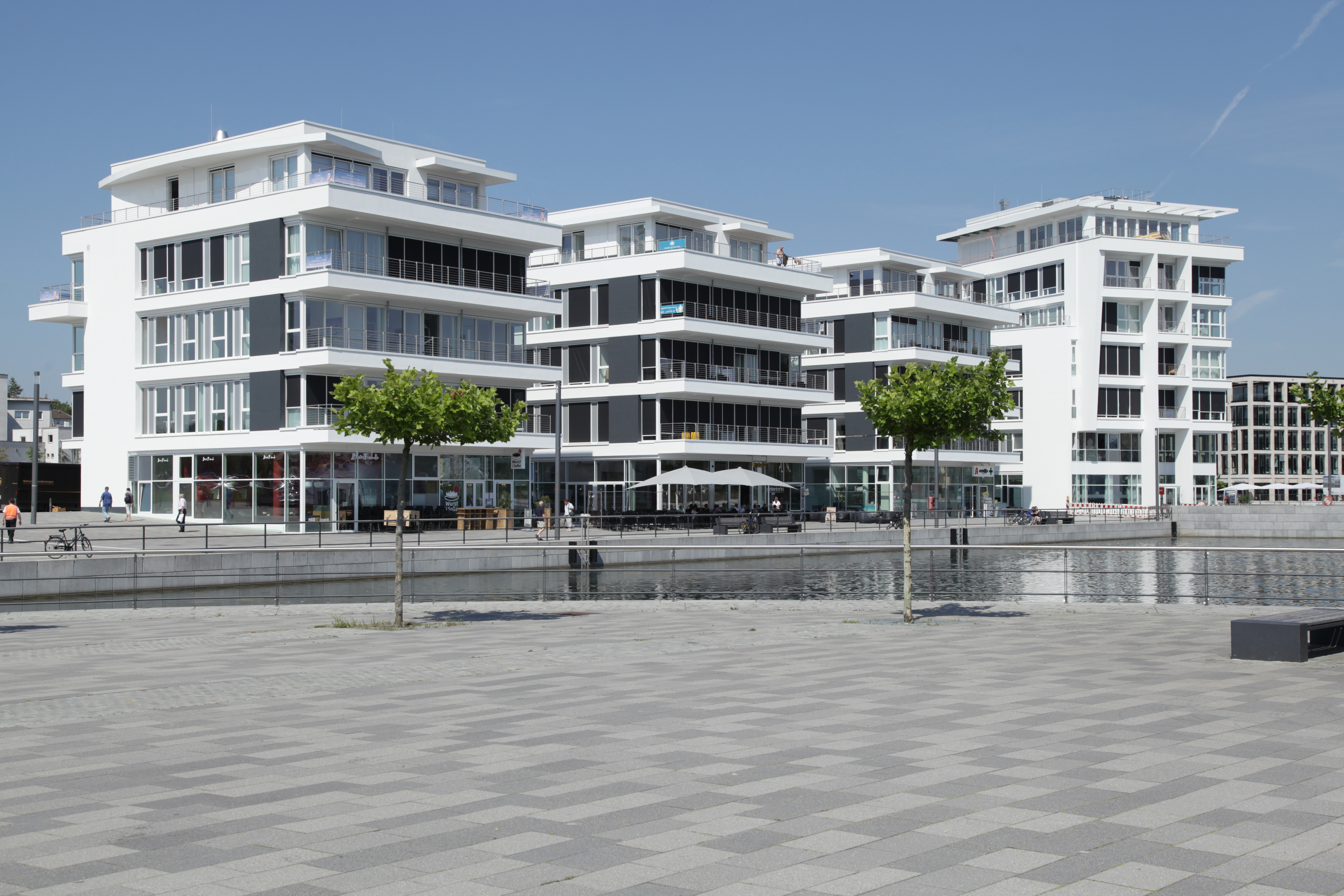 Blick von der Kulturinsel auf Am Kai in Dortmund